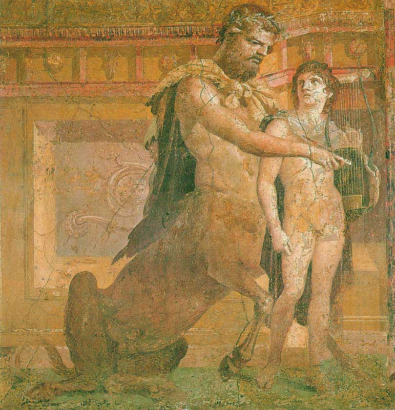 Museo Archeologico Nazionale di Napoli (inv. nr. 9109). Da Herculaneum, Basilica - L'affresco mostra il centauro Chirone, pedagogo di Achille, che insegna all'eroe ancora giovinetto l'uso della lira. Il prototipo per questo affresco non è stato un altro dipinto ma una statua che Plinio il Vecchio ricorda era esposta a Roma nei Saepta Iulia.